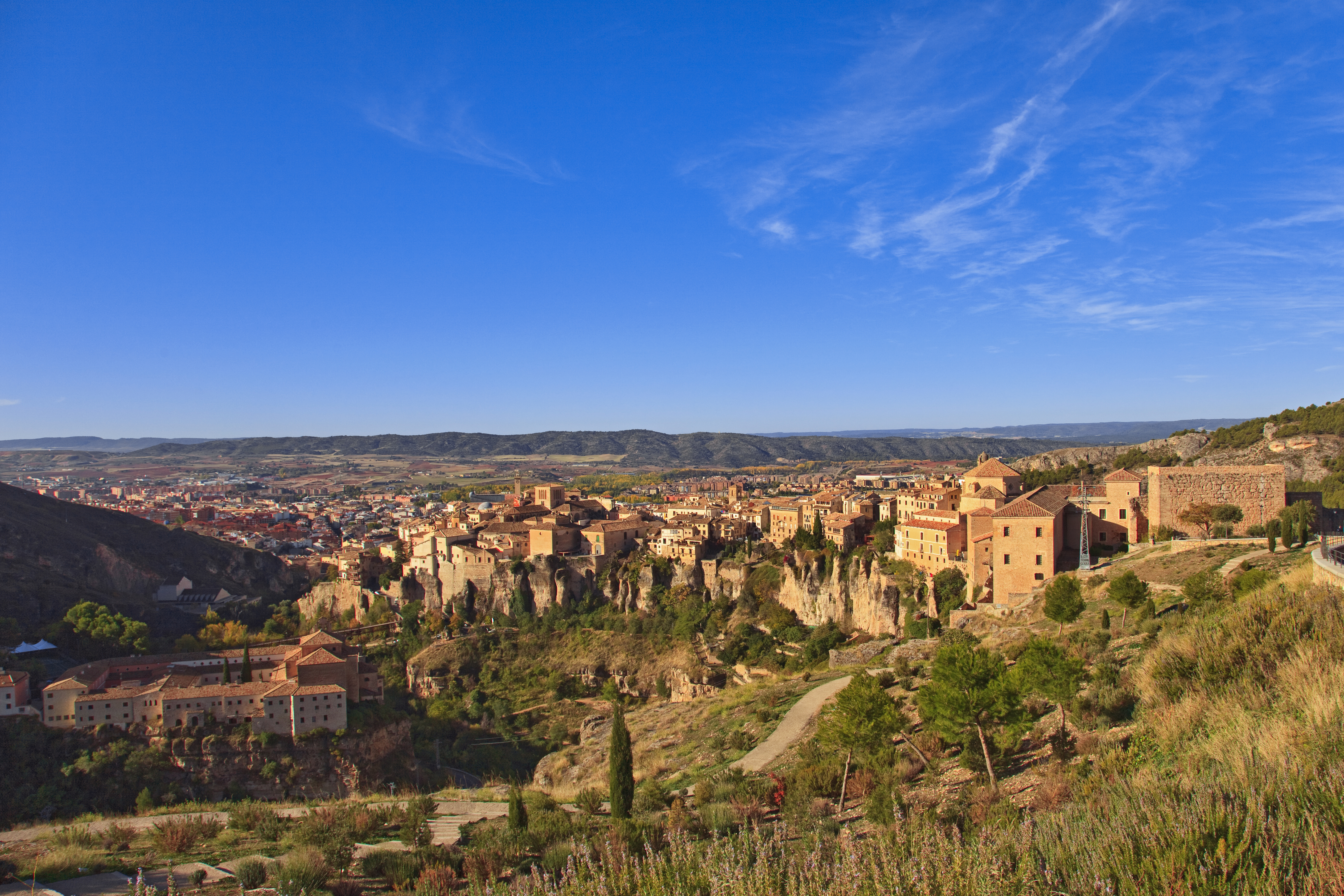 Cuenca. Castilla - La Mancha. Spain